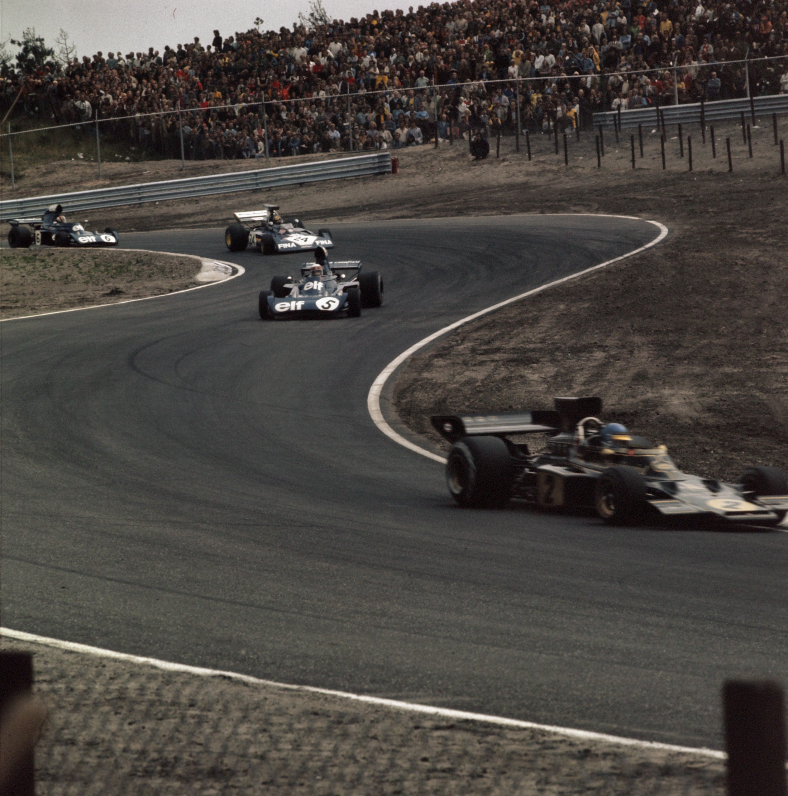 Collectie / Archief : Fotocollectie Anefo Reportage / Serie : [ onbekend ] Beschrijving : Grand Prix van Nederland op circuit Zandvoort; Peterson leidt, gevolgd door Stewart, Pace en Cevert Datum : 16 augustus 1973 Locatie : Noord-Holland, Zandvoort Trefwoorden : circuits, racewagens Persoonsnaam : Roger Williamson Fotograaf : Mieremet, Rob / Anefo Auteursrechthebbende : Nationaal Archief Materiaalsoort : Dia (kleur) Nummer archiefinventaris : bekijk toegang 2.24.01.07 Bestanddeelnummer : 254-9434